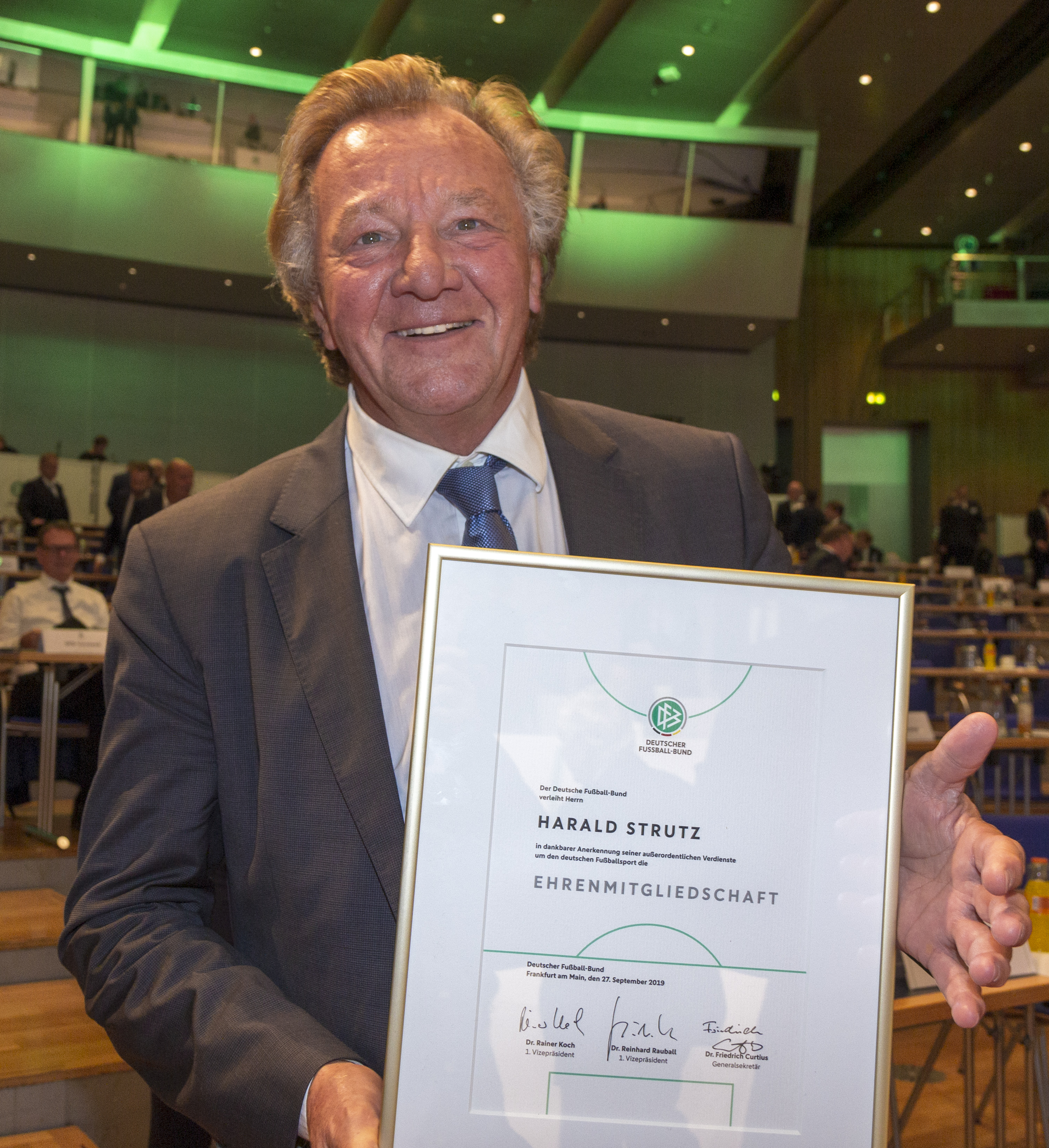 Harald Strutz am 27. September 2019 beim DFB Bundestag in Frankfurt am Main.